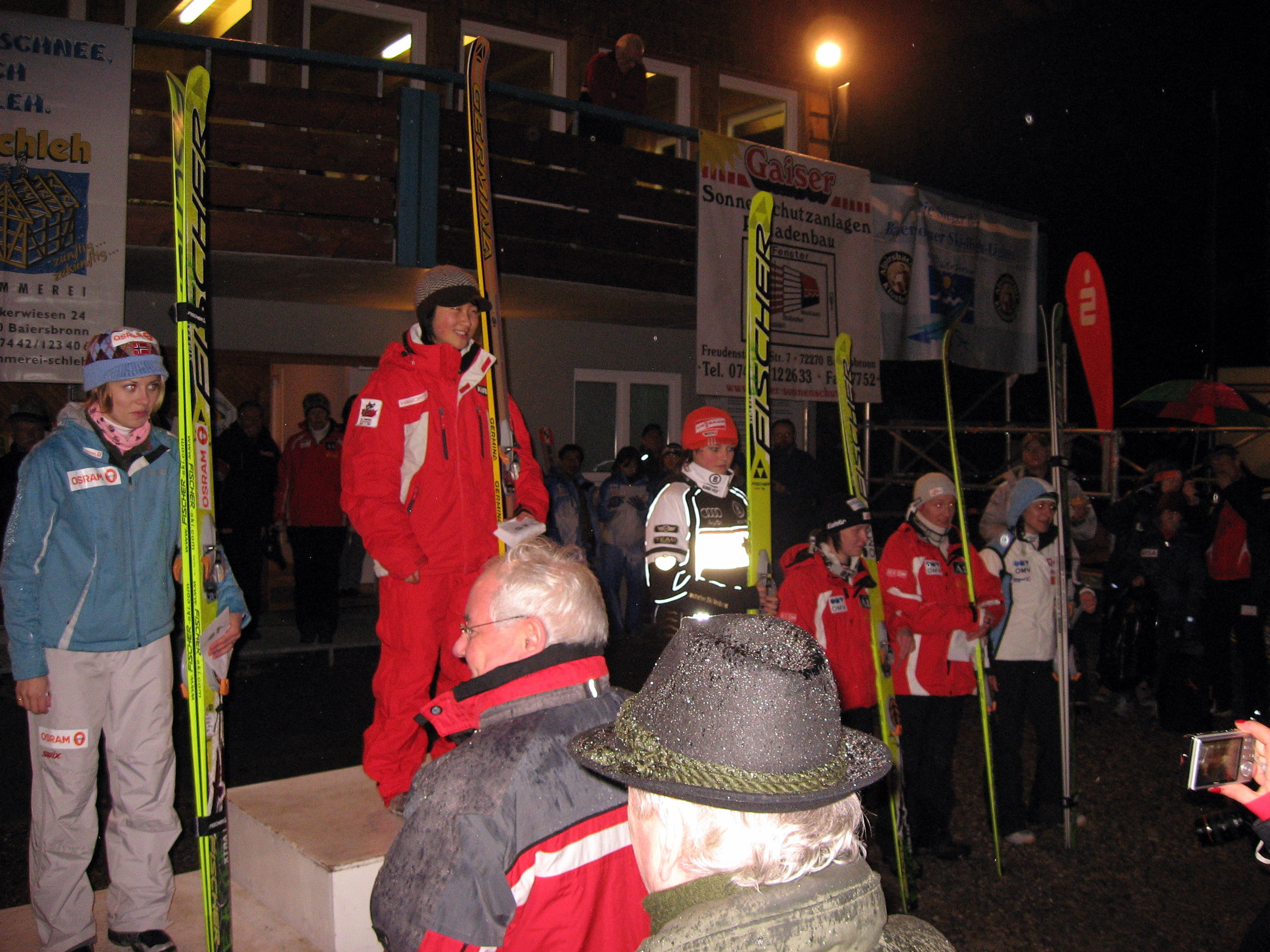 Victory ceremony at Ladies COC ski jumping in Baiersbronn (GER) 2008 (Anette Sagen, Atsuko Tanaka, Carina Vogt, Jaqueline Seifriedsberger, Daniela Iraschko, Maja Vtič)